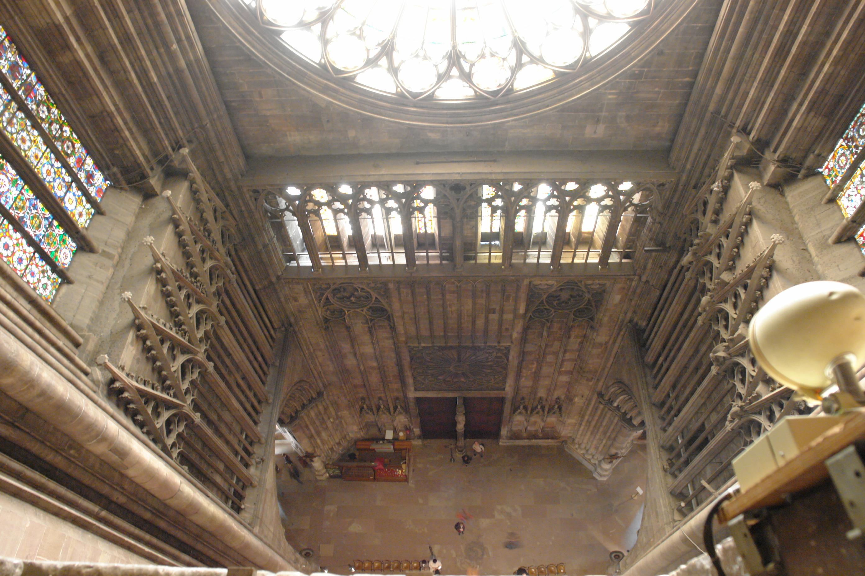 Vue en plongée depuis les greniers de la Cathédrale de Strasbourg face à la rosace sur l'entrée principale .